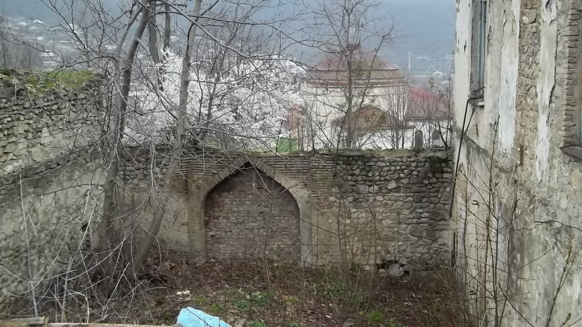 Şəki xan sarayı həyətinin köhnə qapısının yeri; həyətin içərisindən görünüş; bu qapıdan qarşısında 20-ci əsrin 90-cı illərinə qədər kiçik, 2x2 m ölçülü kilsə vardı və bu kilsə 1828-ci ildə xanın ev məscidinin yerində yaradılmışdır.